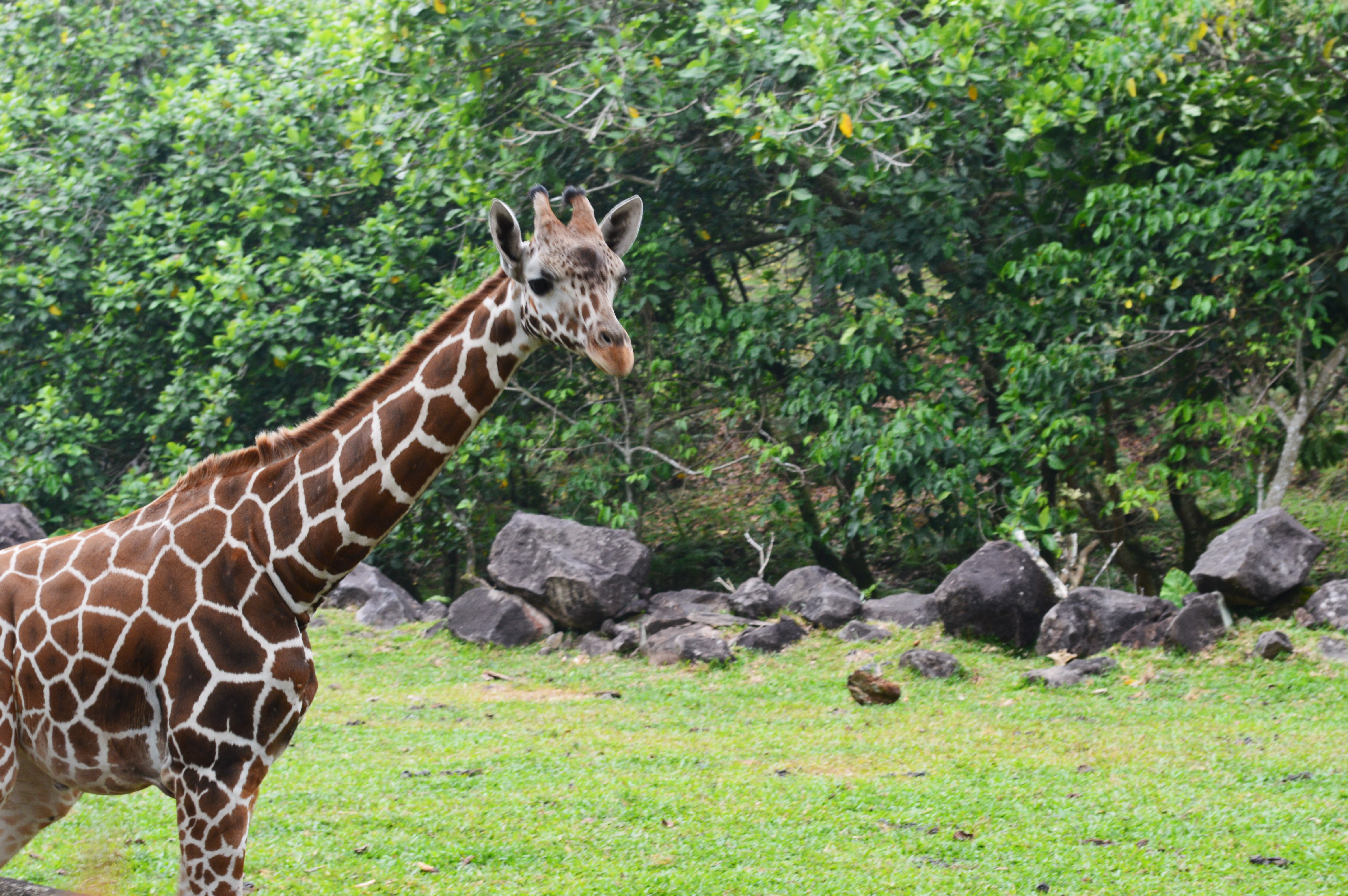 Taman Safari Prigen terletak di Pasuruan, Jawa Timur, Kebun binatang ini masih terbilang baru. Koleksi hewan di Taman Safari Prigen ini juga banyak.